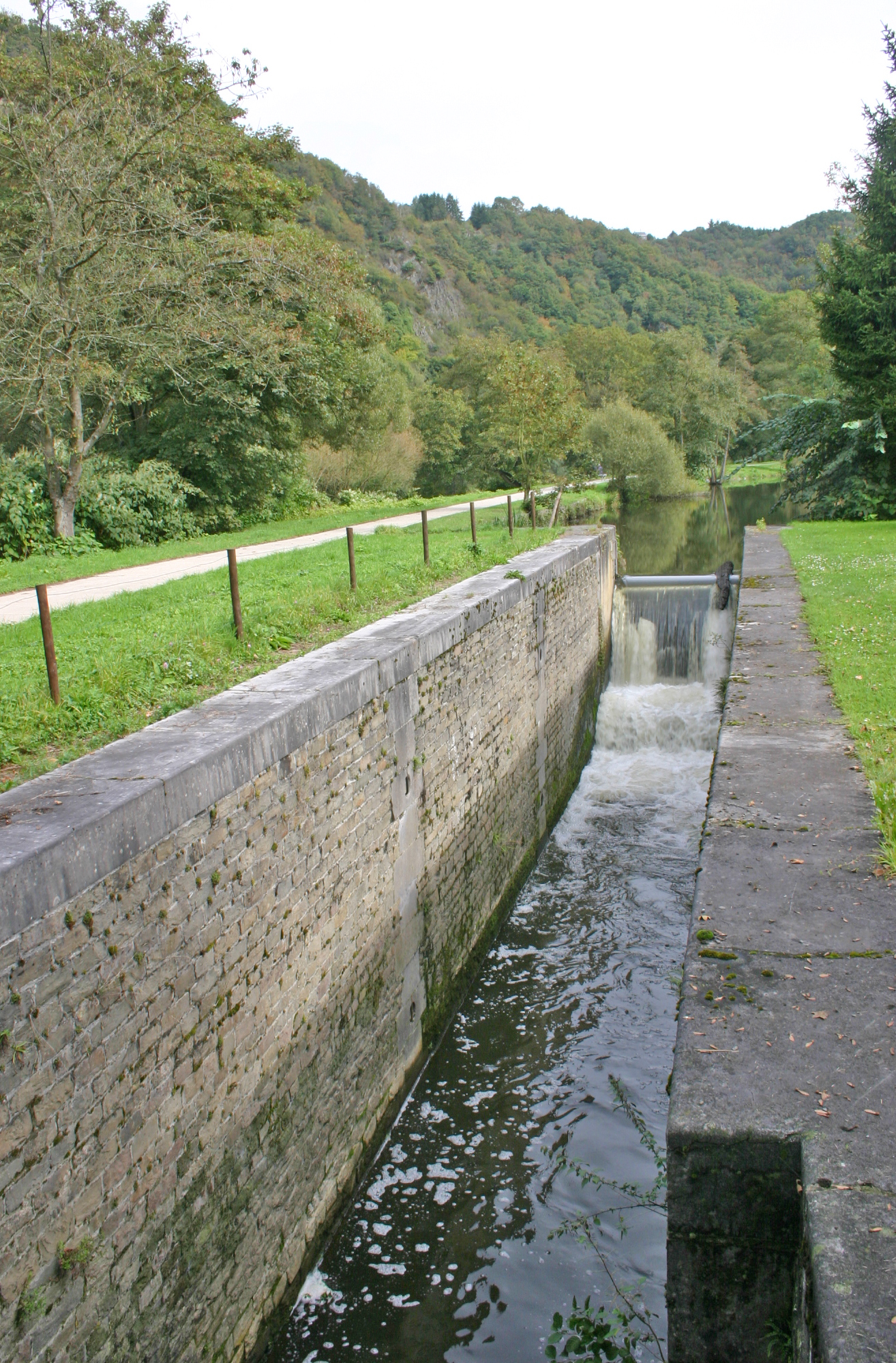 Schleis 15 zu Poulseur